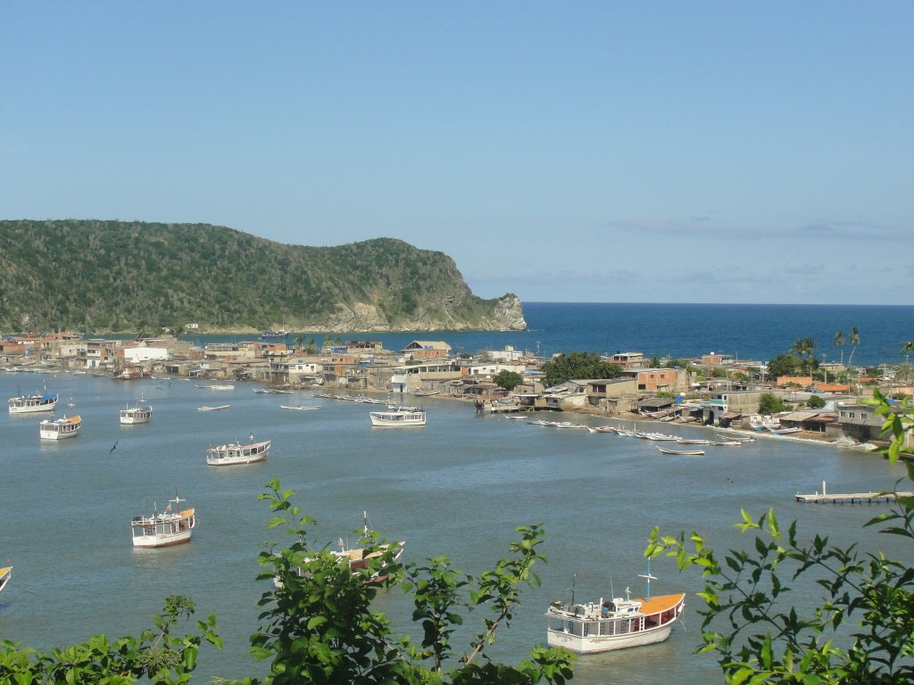 Ruta Nacional Rio Caribe, Estado Sucre Venezuela